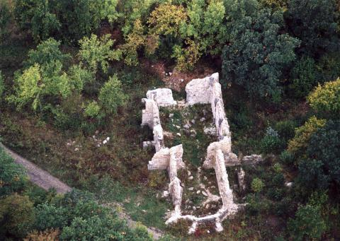 Felsőnyárád, Hungary, aerialphotography